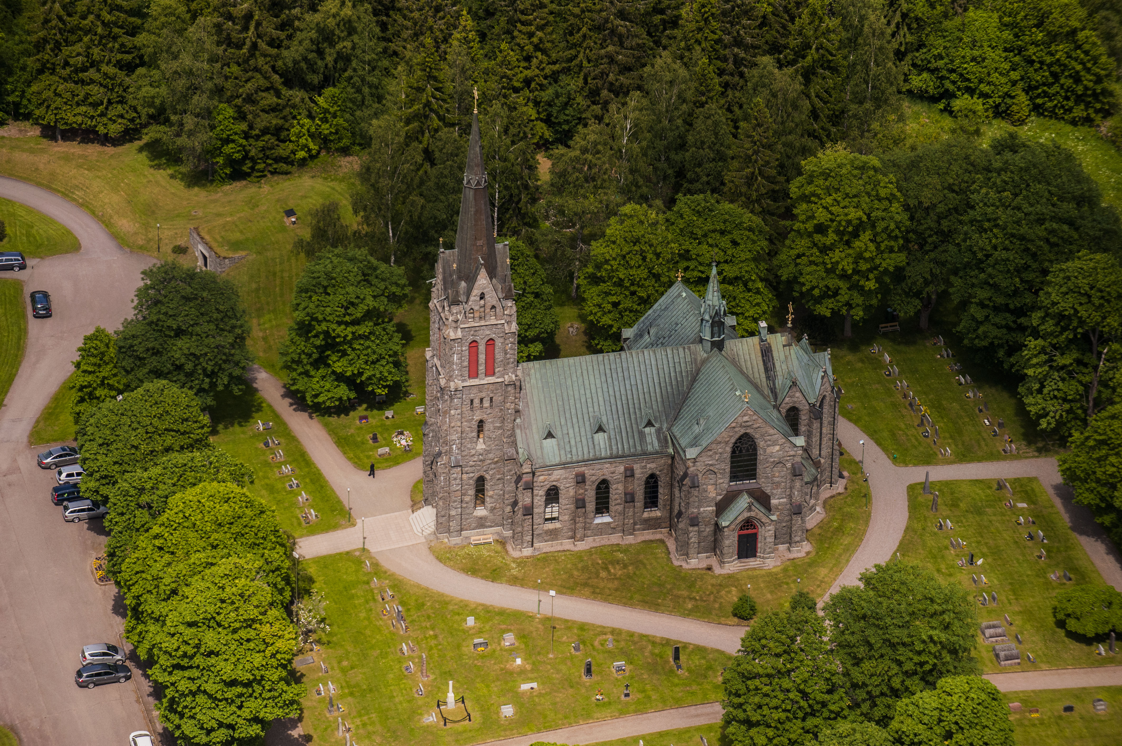 Vallsjö ka